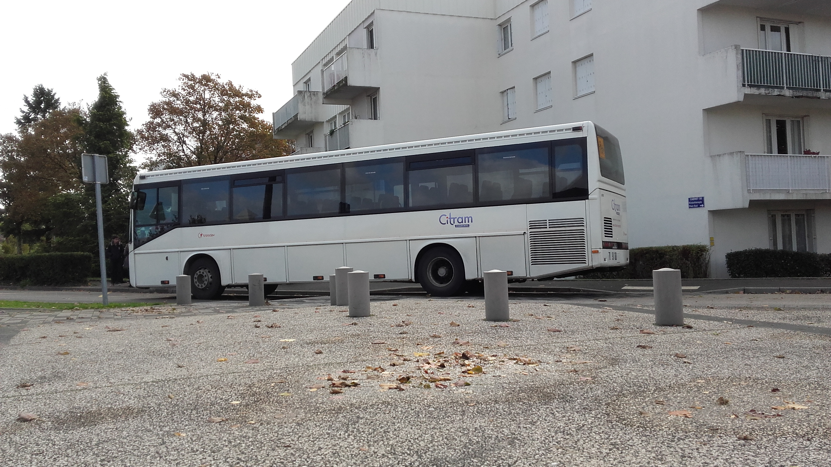 Irisbus Ares du réseau Citram Charente, livrée blanche, à Ma Campagne (Angoulême)